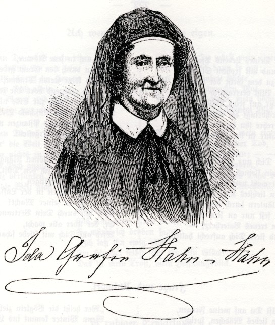 Stich eines Altersportraits der Schriftstellerin Ida Gräfin Hahn-Hahn.